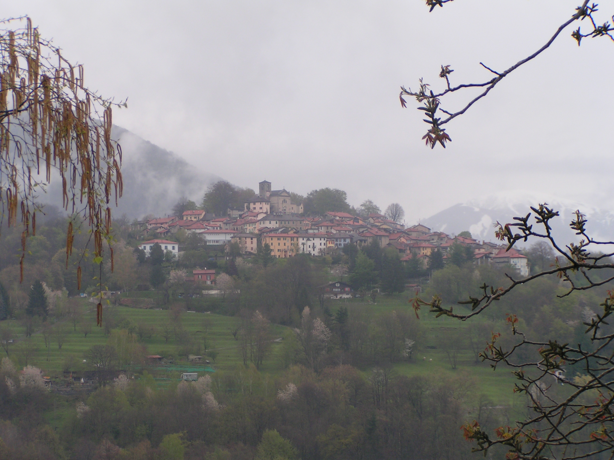 Vista di Breno, frazione di Alto Malcantone